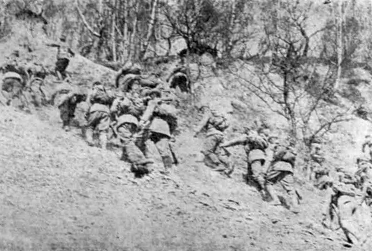 D - Vanatorii de munte in luptele de la Ciresoaia Kiritescu 623